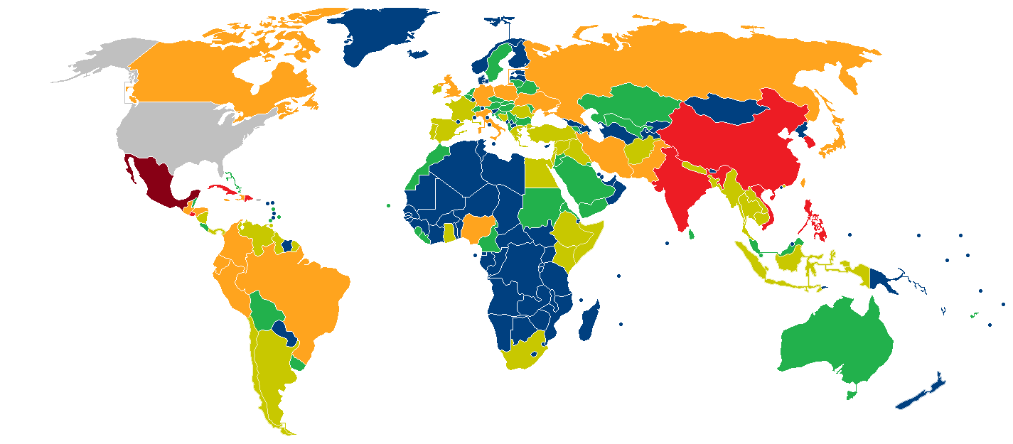 Populația născută în străinătate a Statelor Unite în 2017.